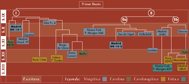 Stemma, diagrama que indica el tipo de escritura y la biblioteca en la que se conservan los manuscritos "Beatos". José Ochoa (